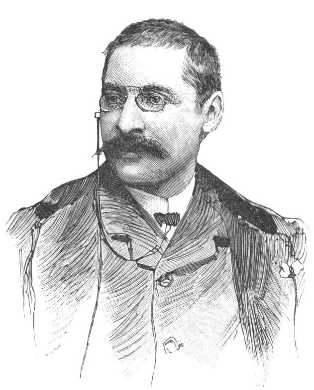 "M. Albert Millaud, homme de lettres. Mort à Paris, le 23 octobre (Phot. Benque)"